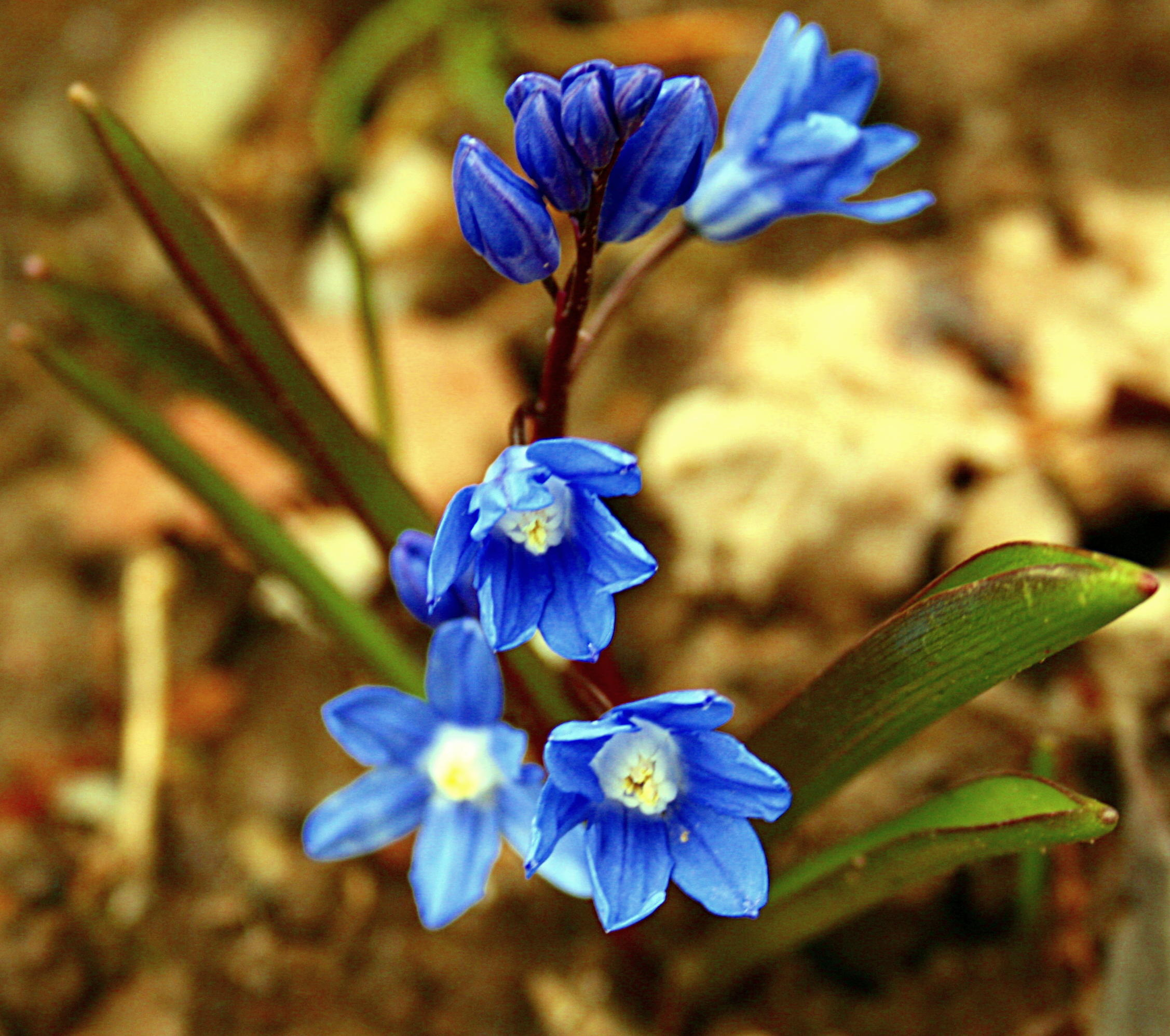 Dunkle Sternhyazinthe (Scilla sardensis)